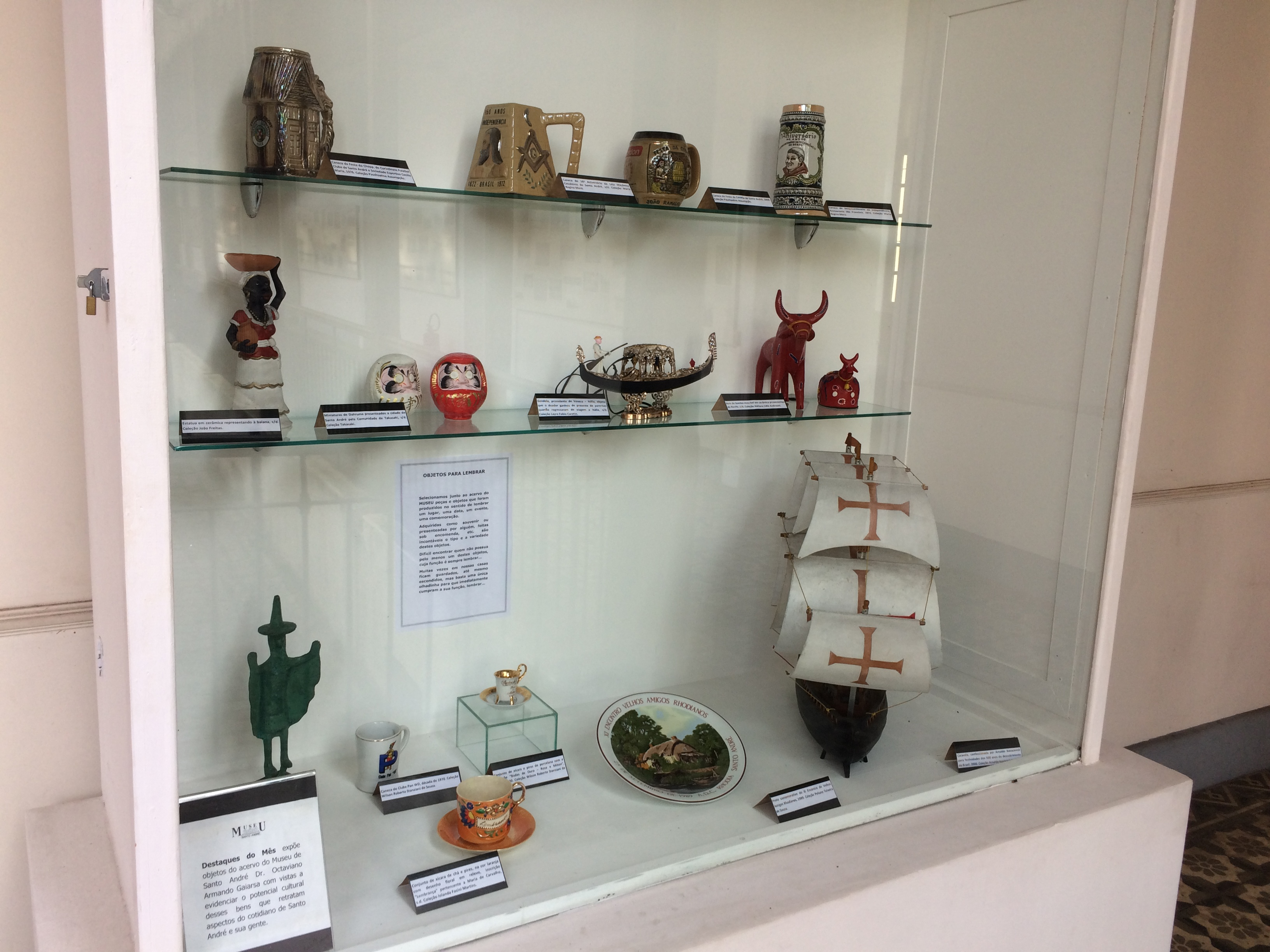 Objetos do acervo do Museu de Santo André Dr. Octaviano Armando Gaiarsa, em Santo André (SP), Brasil.